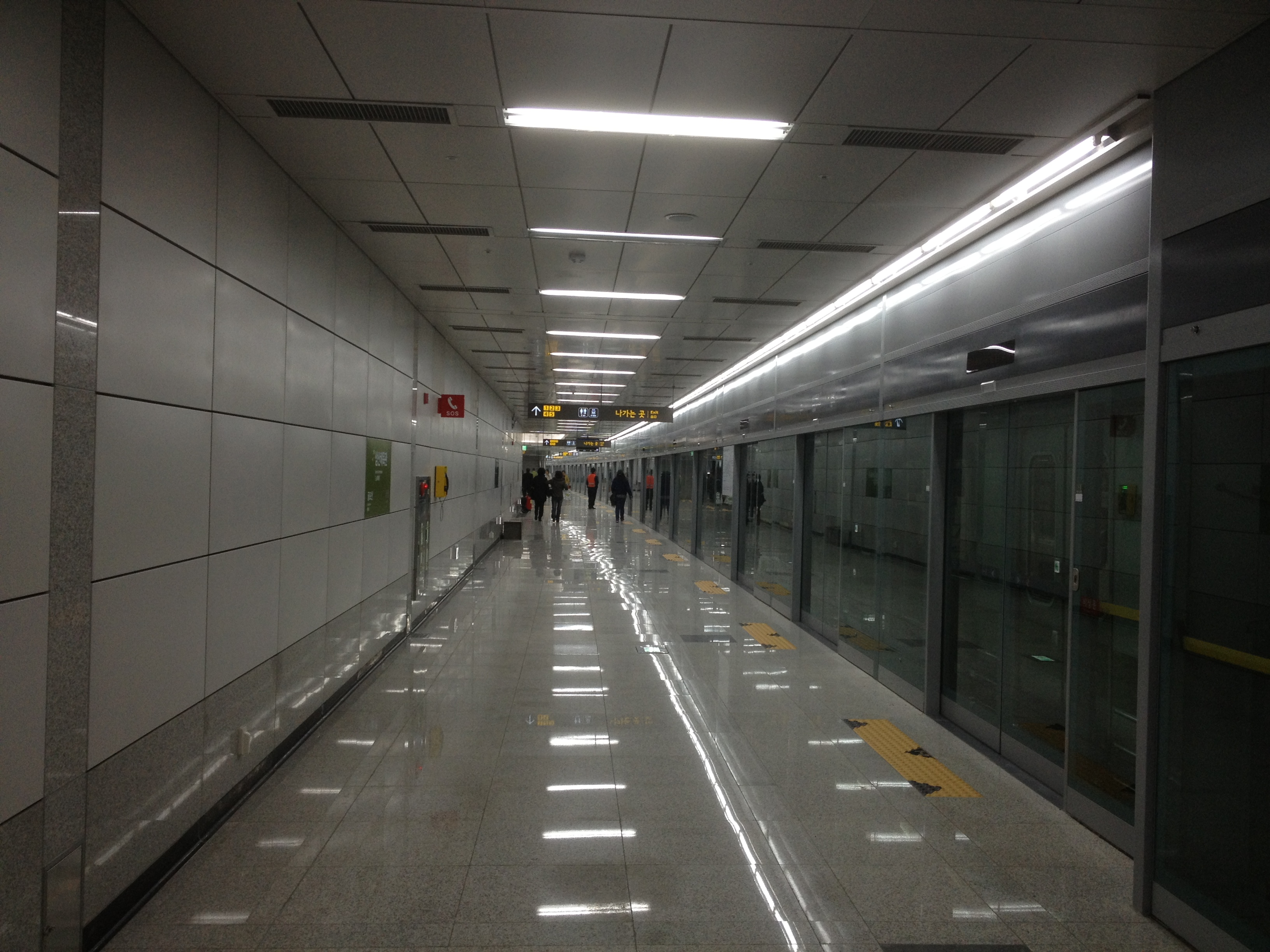 삼산체육관역 승강장